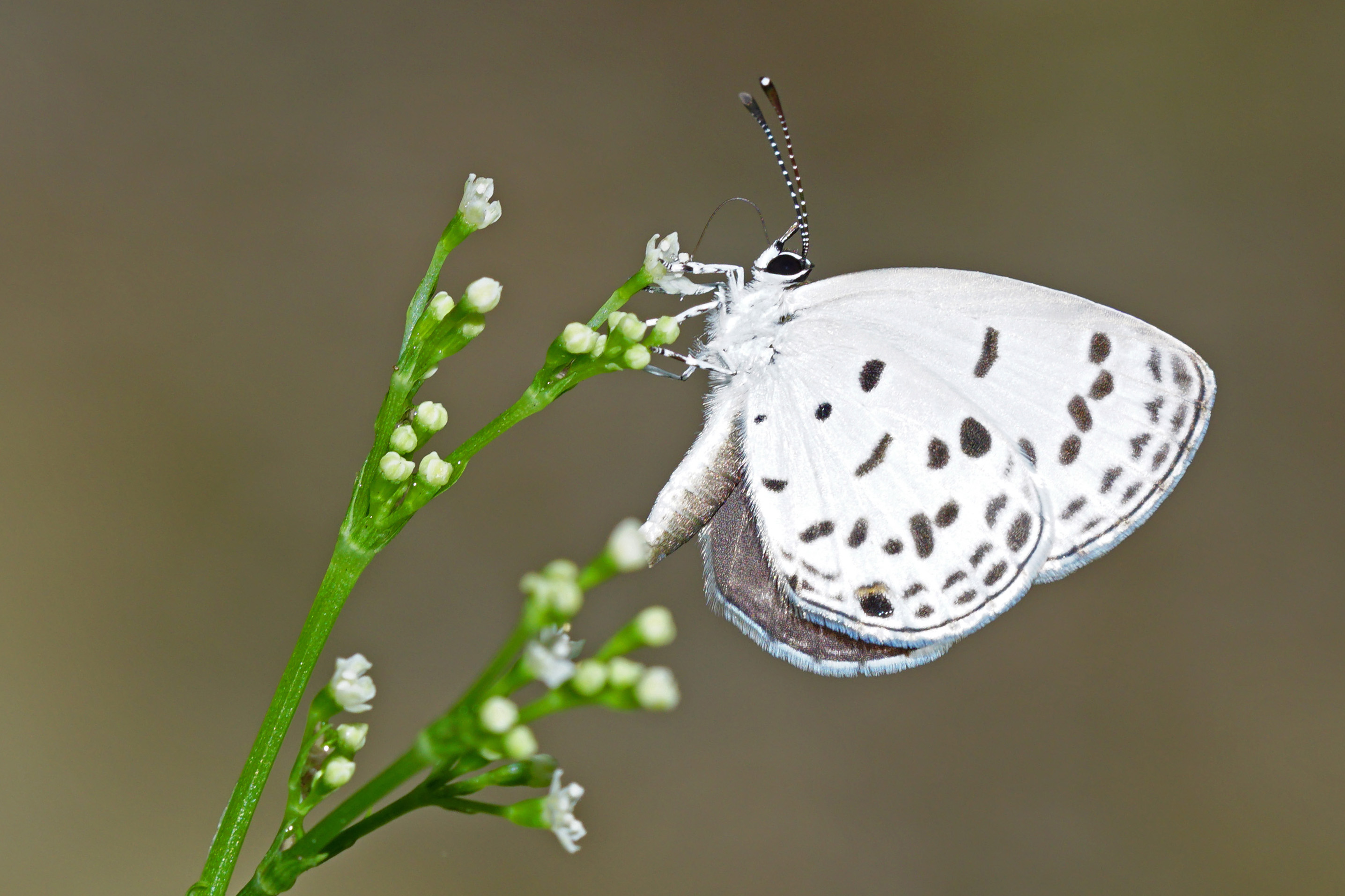 森灰蝶 Shijimia moorei